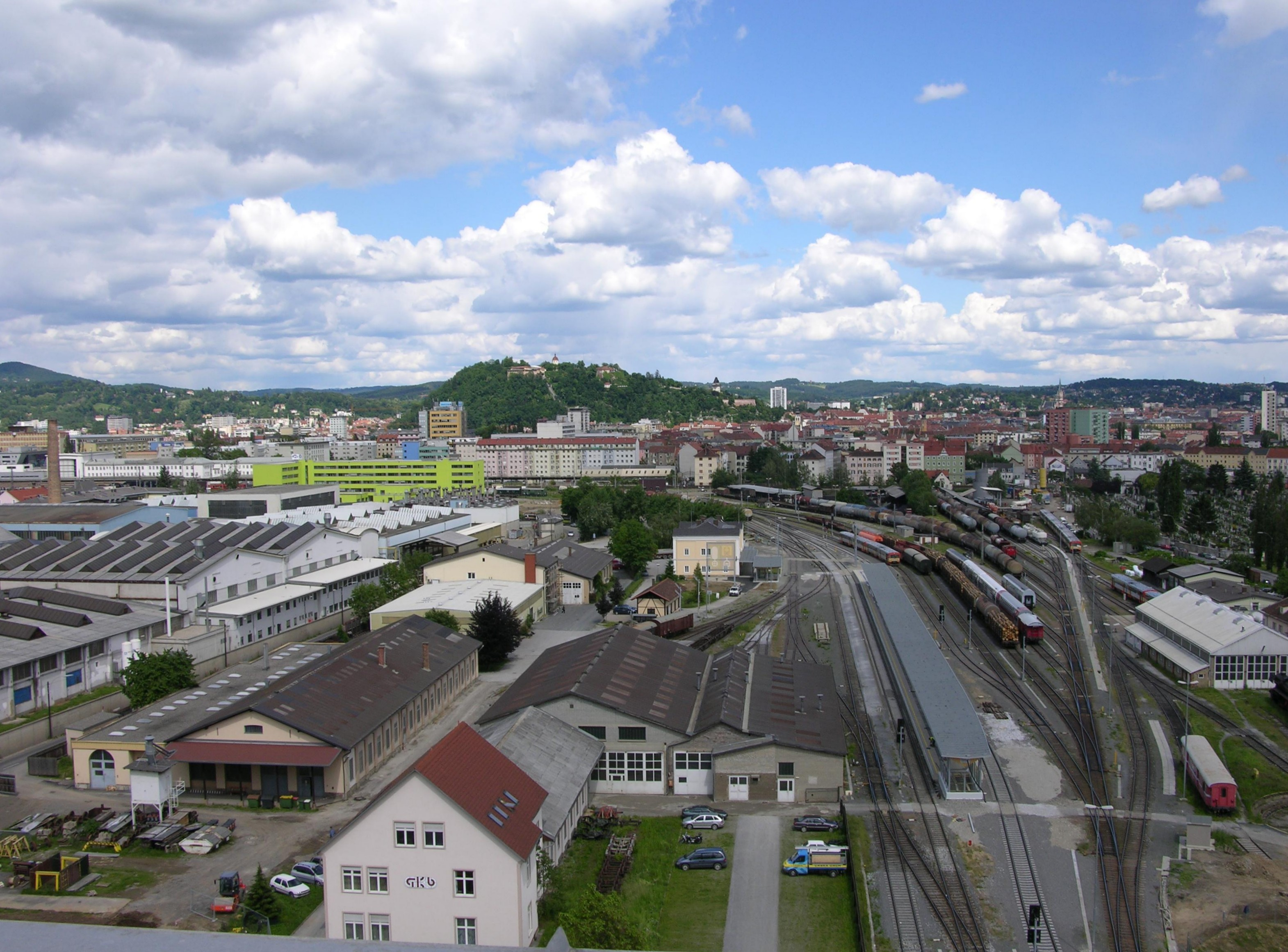 Blick Richtung Innenstadt mit dem Graz Köflacherbahnhof im Vordergrund